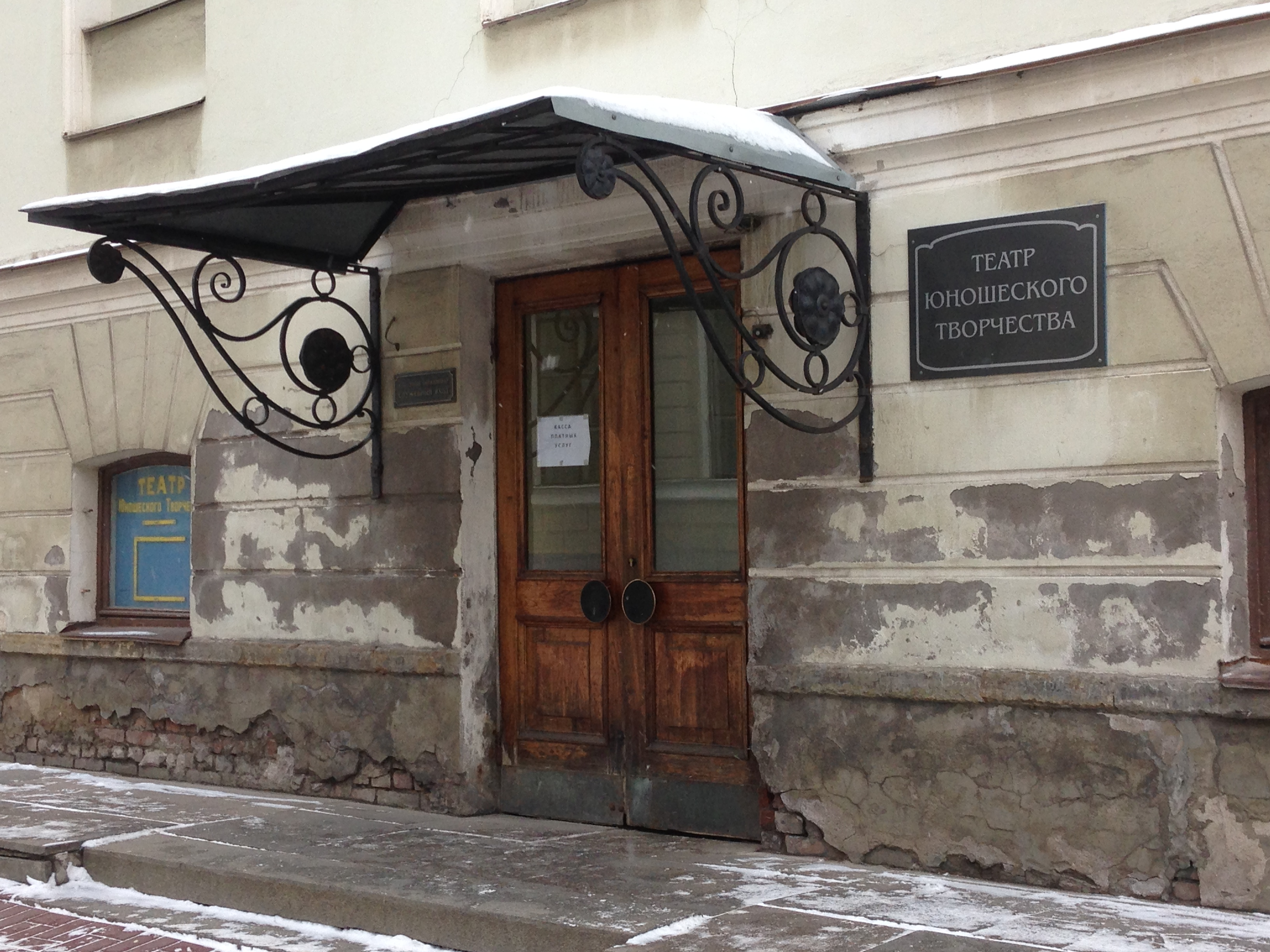 Вход в Театр Юношеского Творчества 2017